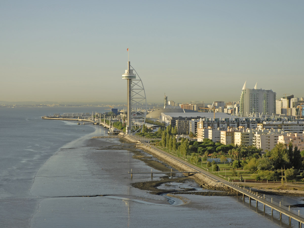 Vue du quartier moderne construit pour l'exposition de 1998 à Lisbonne